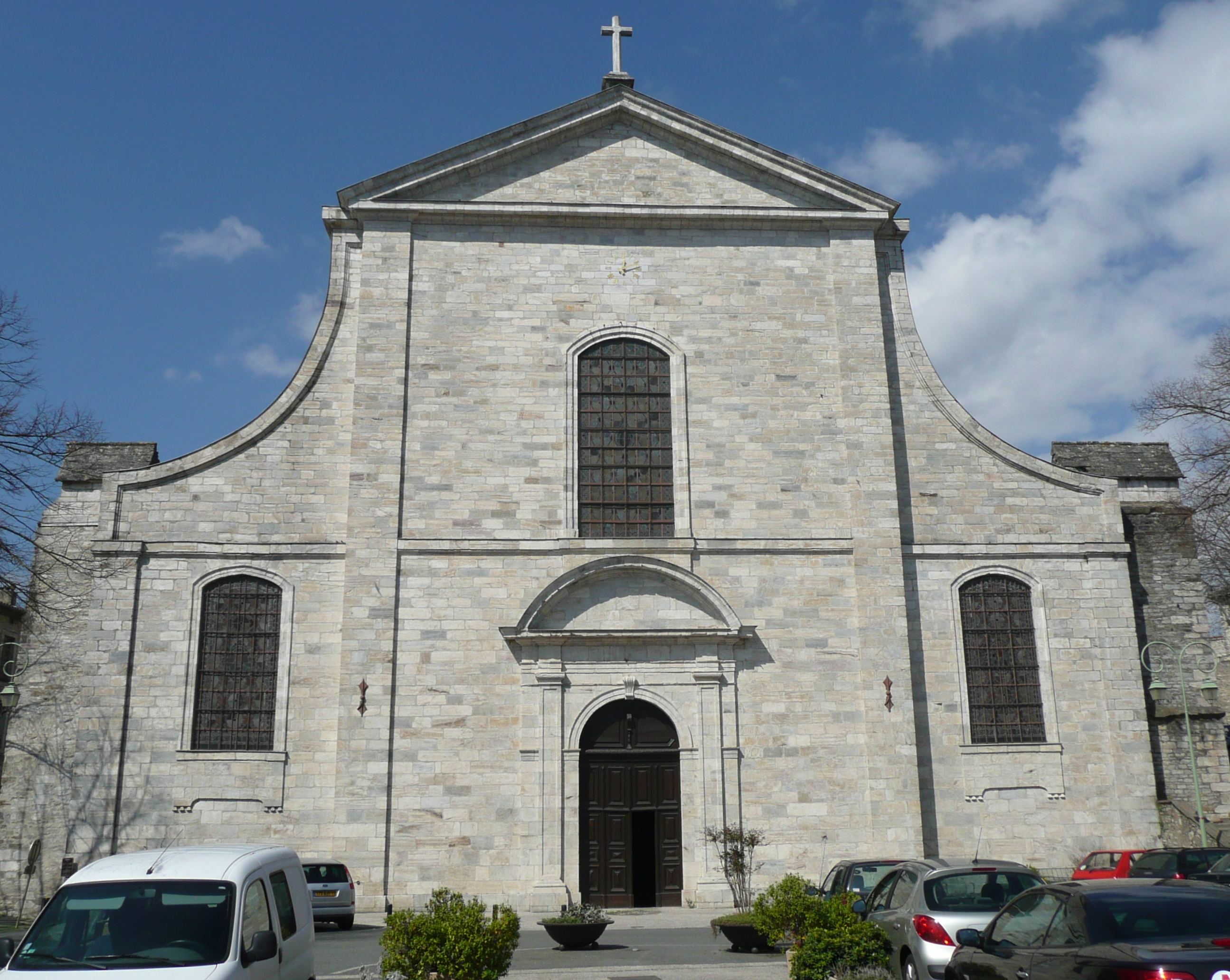 Saint-Pons-de-Thomières (Hérault) - cathédrale - Façade Est de style classique datant de 1711